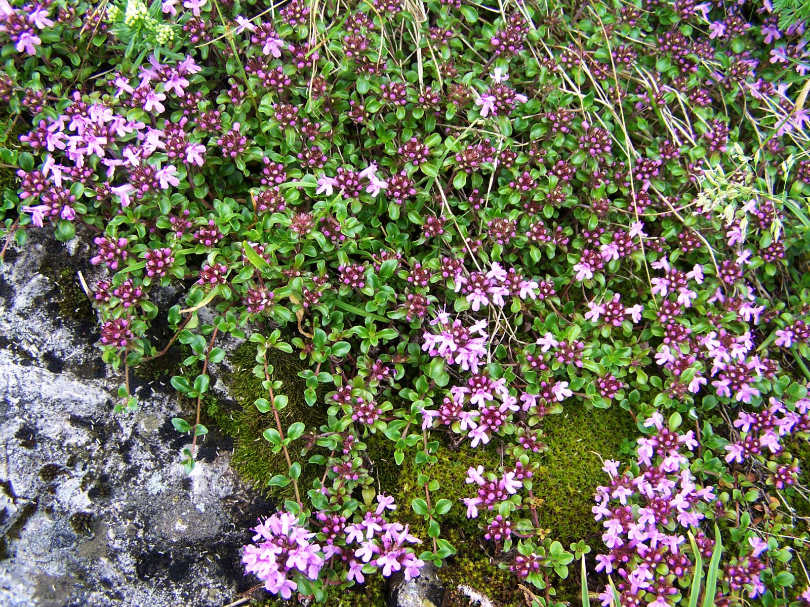 Thymus alpina (habitat:Tatra Mountains, Hala Upłaz)